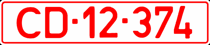 Номерний знак Кабо-Верде